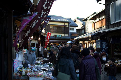 Kashiya Yokochō (菓子屋横丁), Kawagoe C, Saitama P.